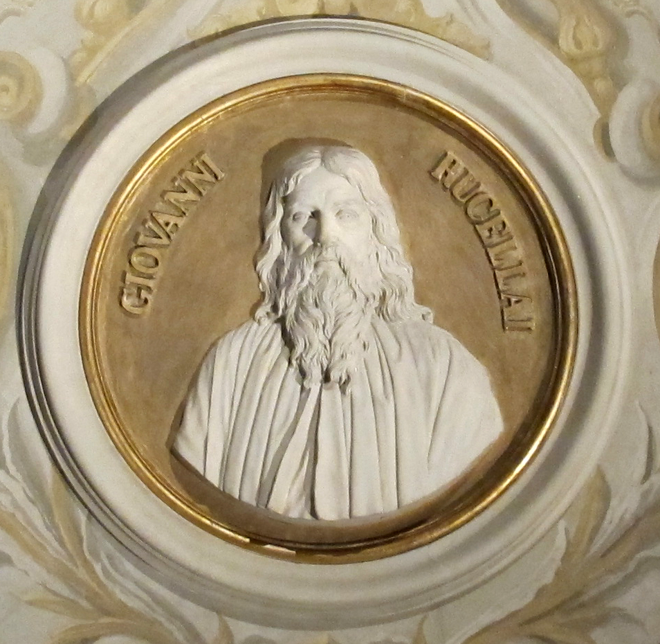 Palazzo Venturi Ginori